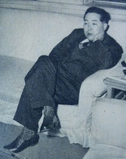 塚原俊郎